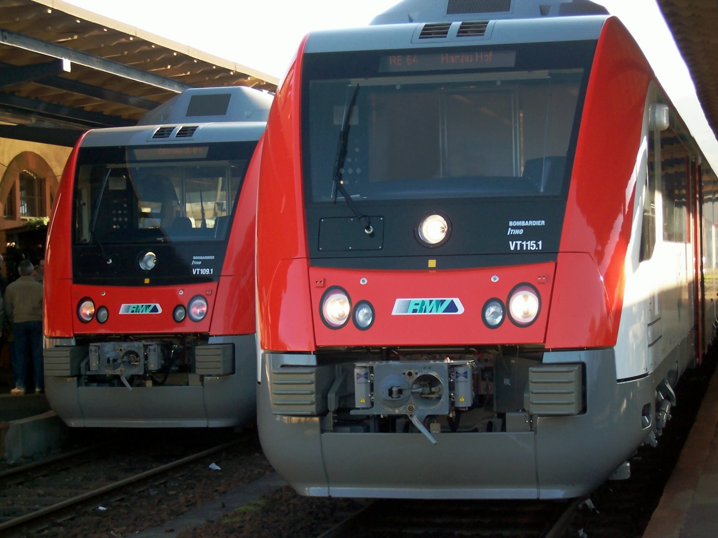 Bildbeschreibung/Description: 2 ITINO D2 der Odenwaldbahn von Bombardier Transportation in Wiebelsbach-Heubach (Groß-Umstadt-Süd) Quelle/Source: selbst fotografiert/self taken Photo Fotograf/Photographer: Markus Flath Datum/Date: 11.12.2005 Deutschland/Germany